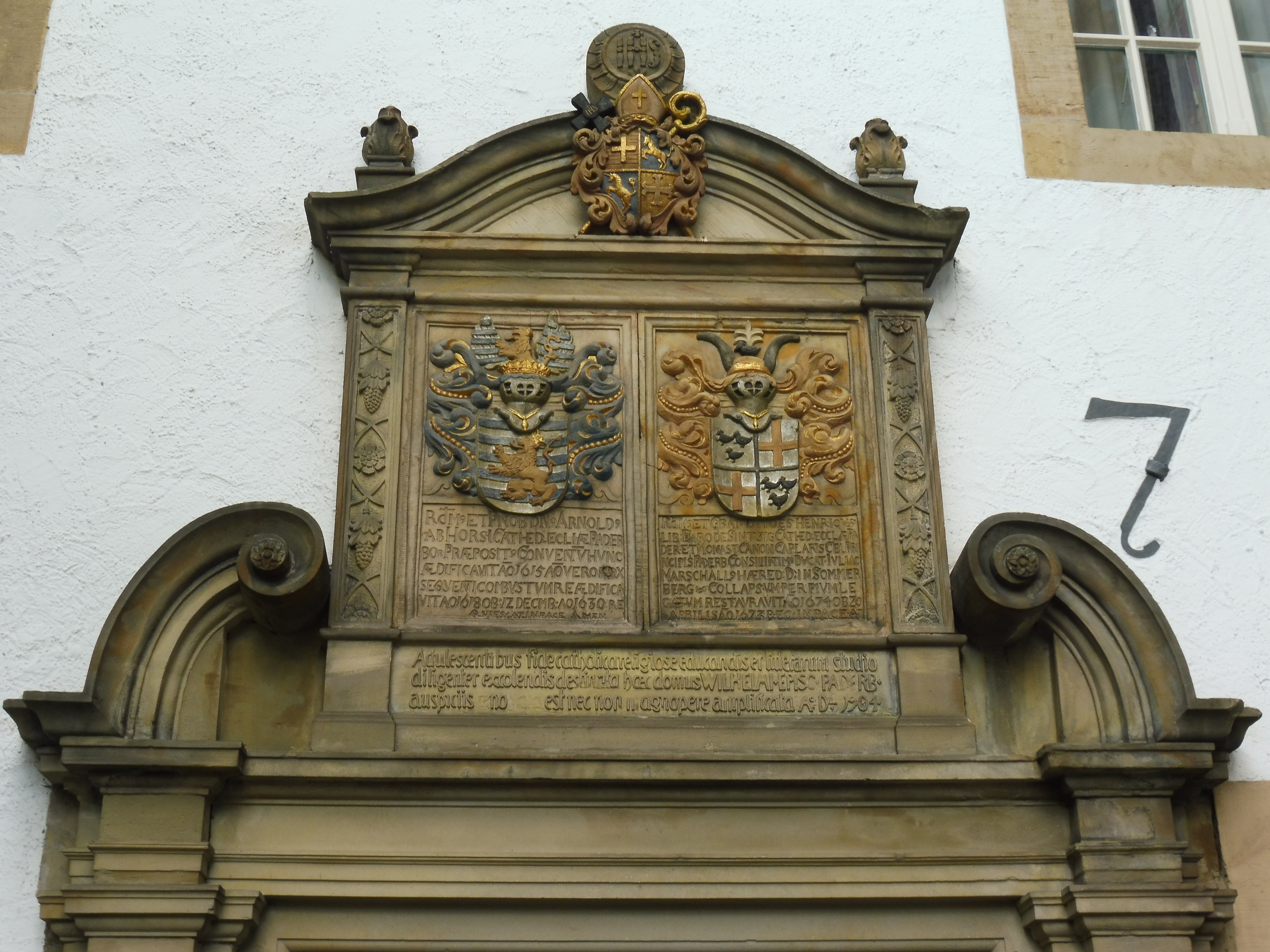 Inschriften und Wappen am Portal zum Collegium Liborianum in Paderborn